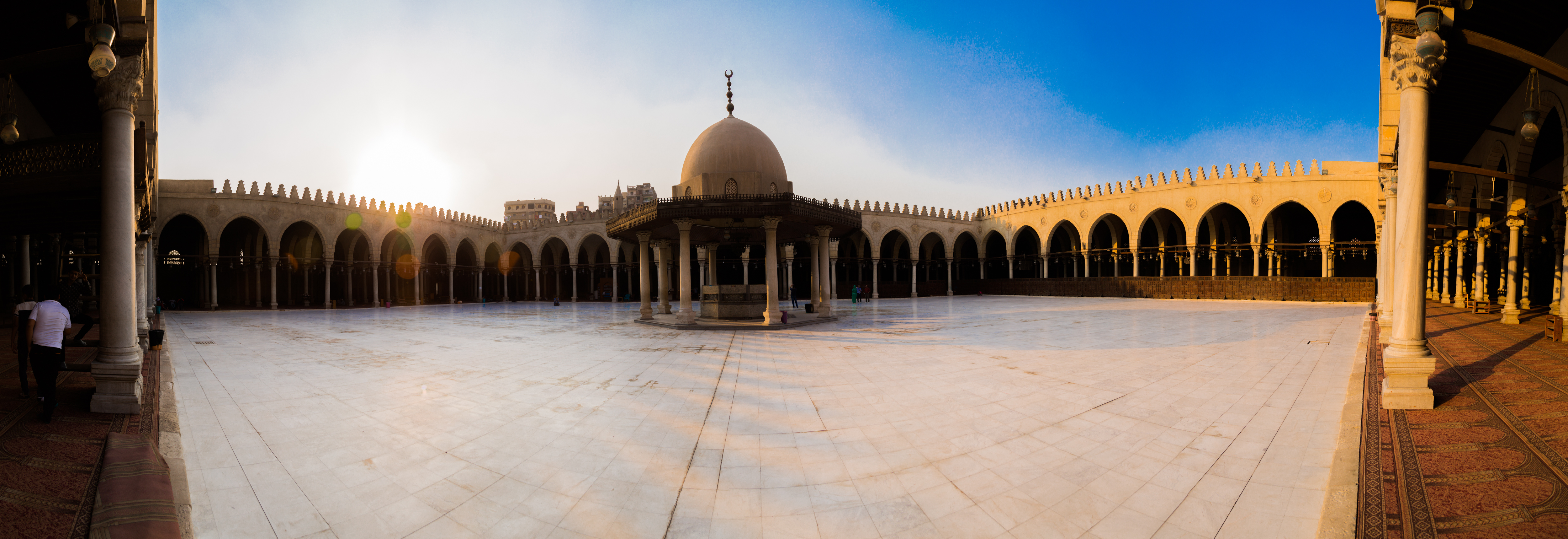 جامع عمر ابن العاص من اشهر واهم الجوامع في مصر